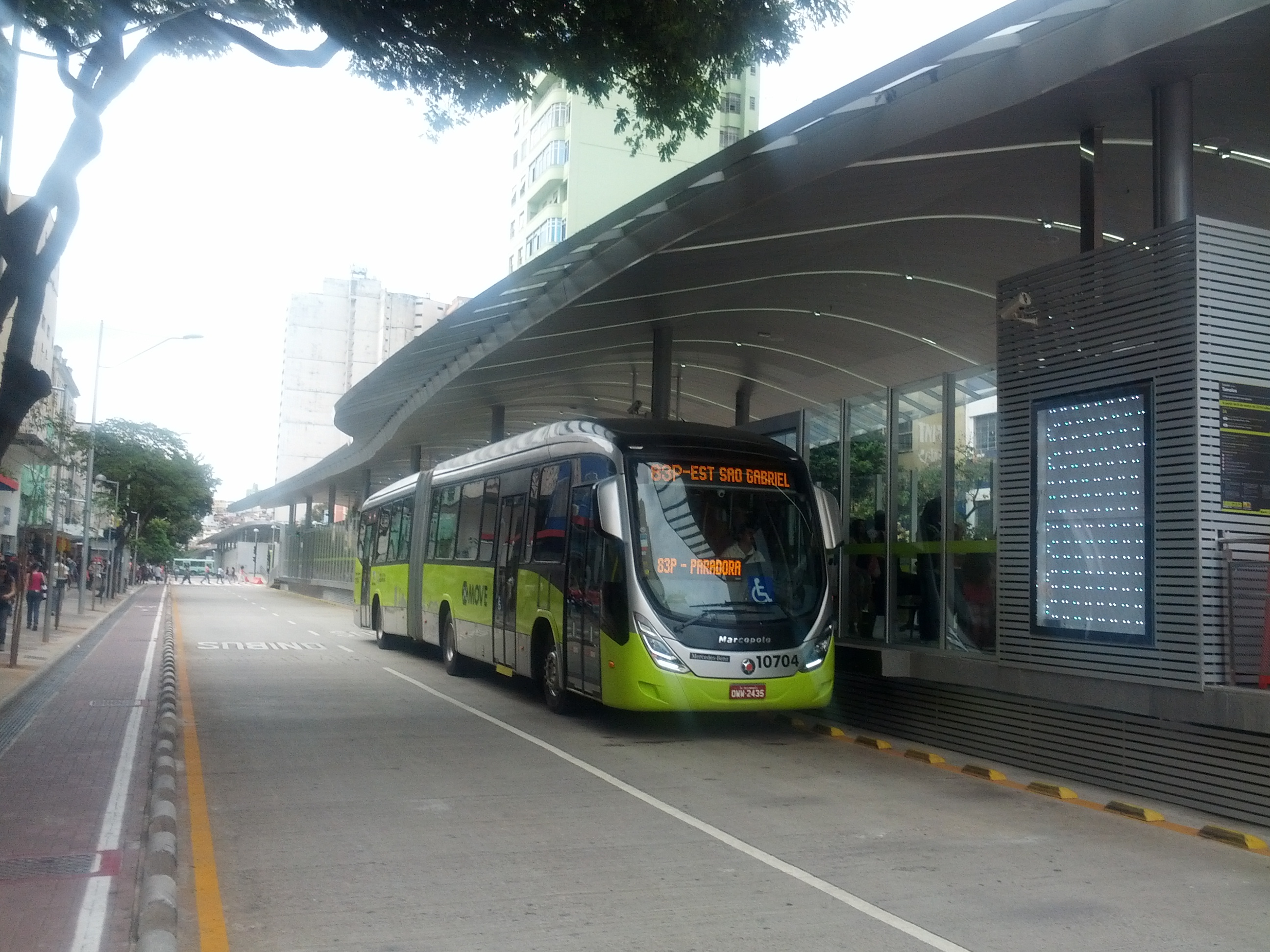 Bus Rapid Transit (BRT) na Avenida Paraná, em Belo Horizonte, Minas Gerais, Brasil.